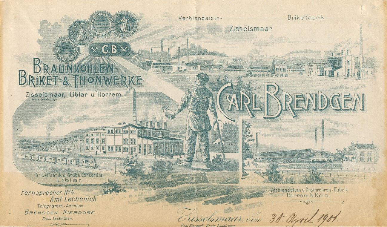 Briefkopf der Brendgen Fabriken